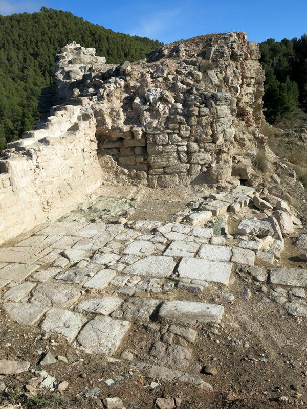 Castell de Jorba, comarca Anoia, Catalunya